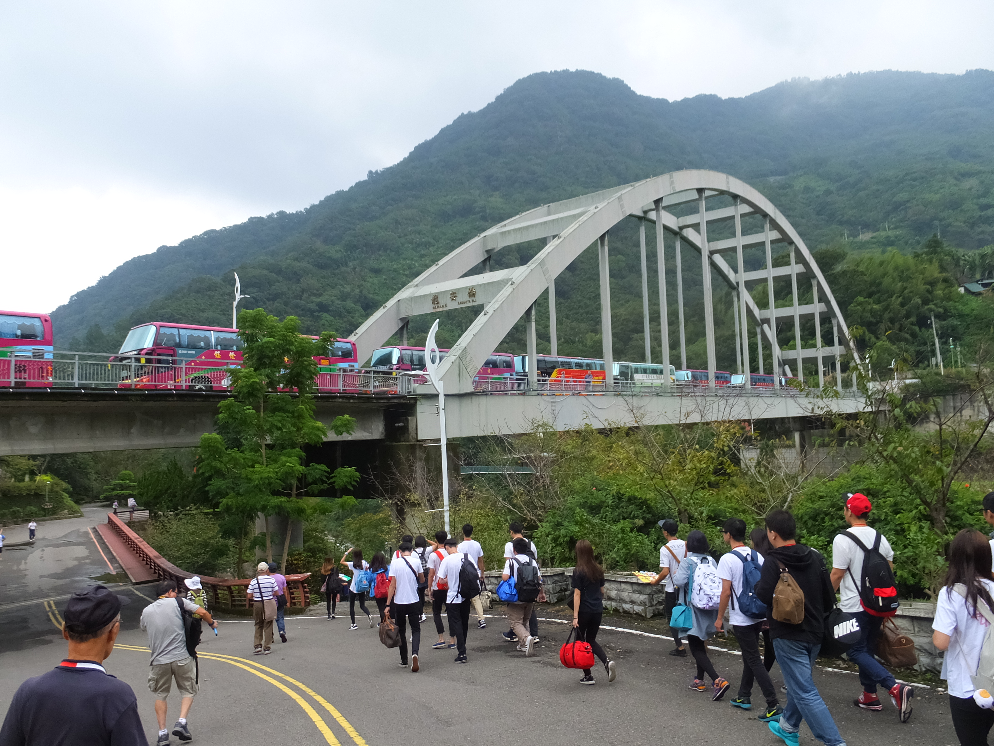 龍安橋 Longan Bridge